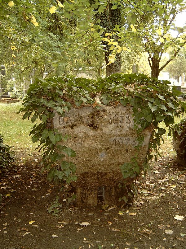 Darvas József (született Dumitrás József, Orosháza, 1912. február 10. – Budapest, 1973. december 3.) író, publicista, politikus sírja Budapesten. Kerepesi temető: 34/2-1-23 [szobrász: Varga Imre]